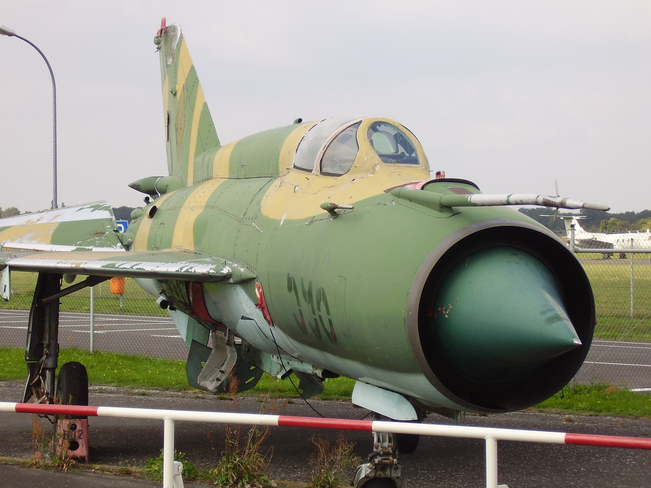 Luftwaffenmuseum der Bundeswehr; Airforce Museum of the Bundeswehr; Berlin-Gatow, MiG-21M